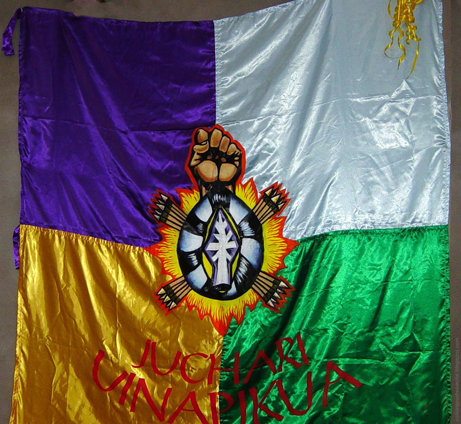 Nuestra Bandera P'urhépecha